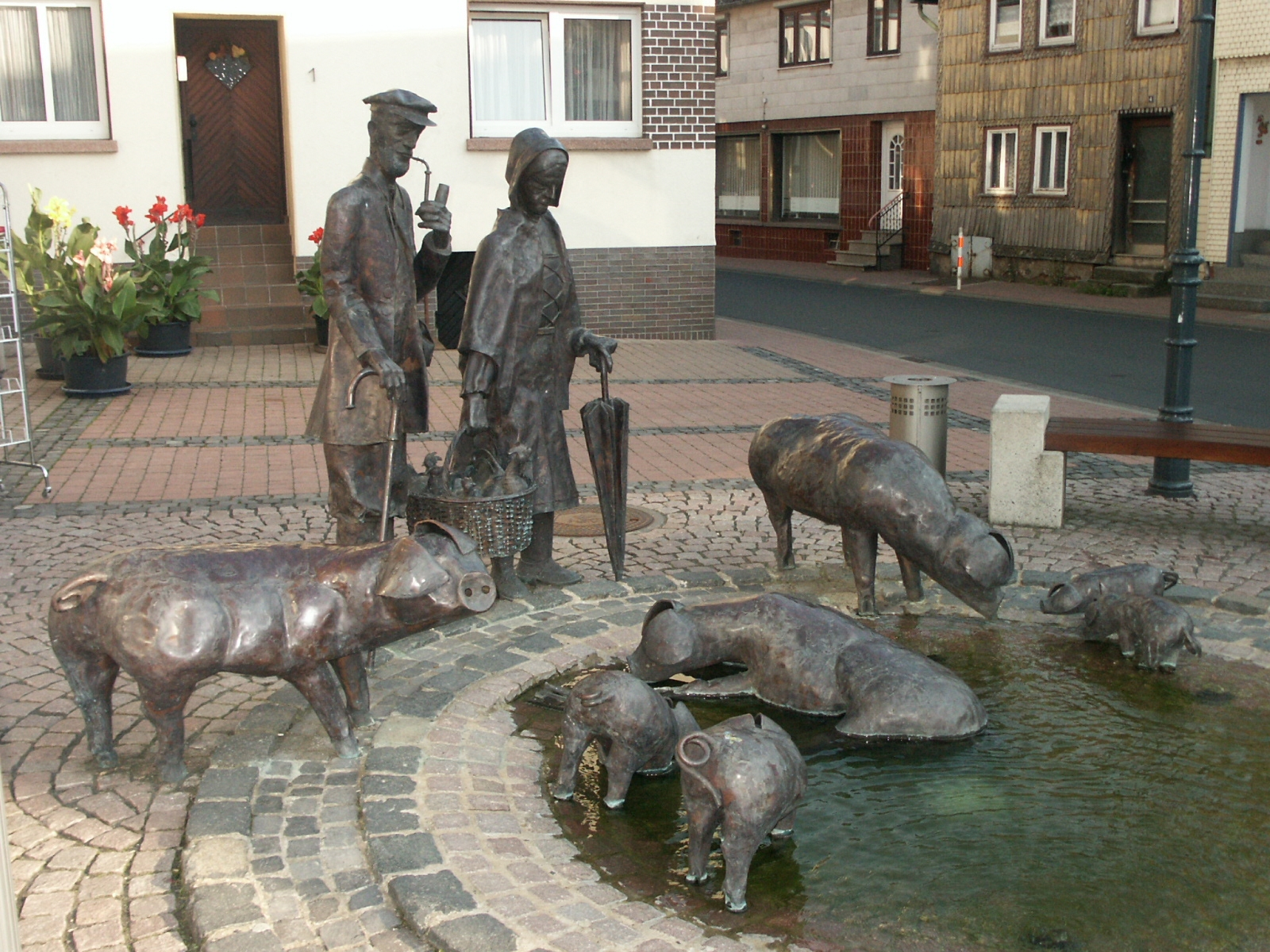 Schweinebrunnen (?) in Steinau selbst fotografiert im September 2004